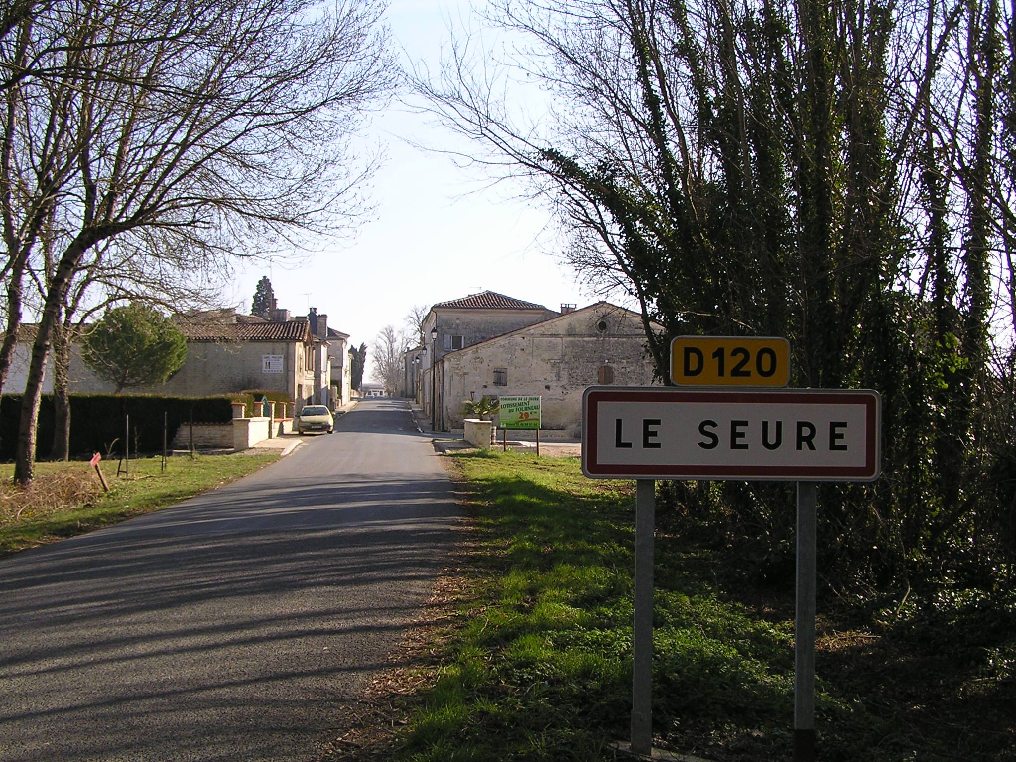 entrée du village du Seure